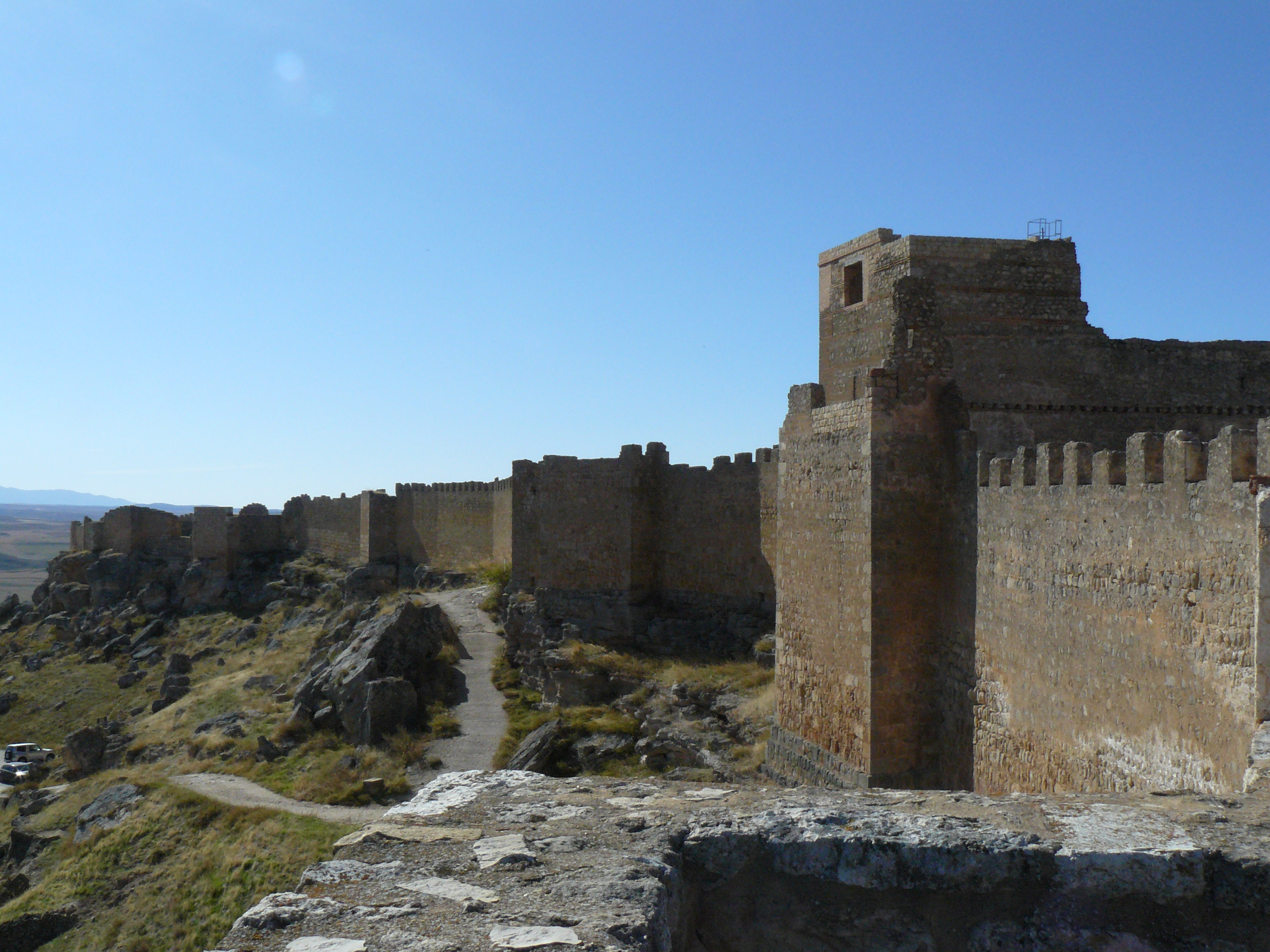 Castillo de Gormaz, Soria.